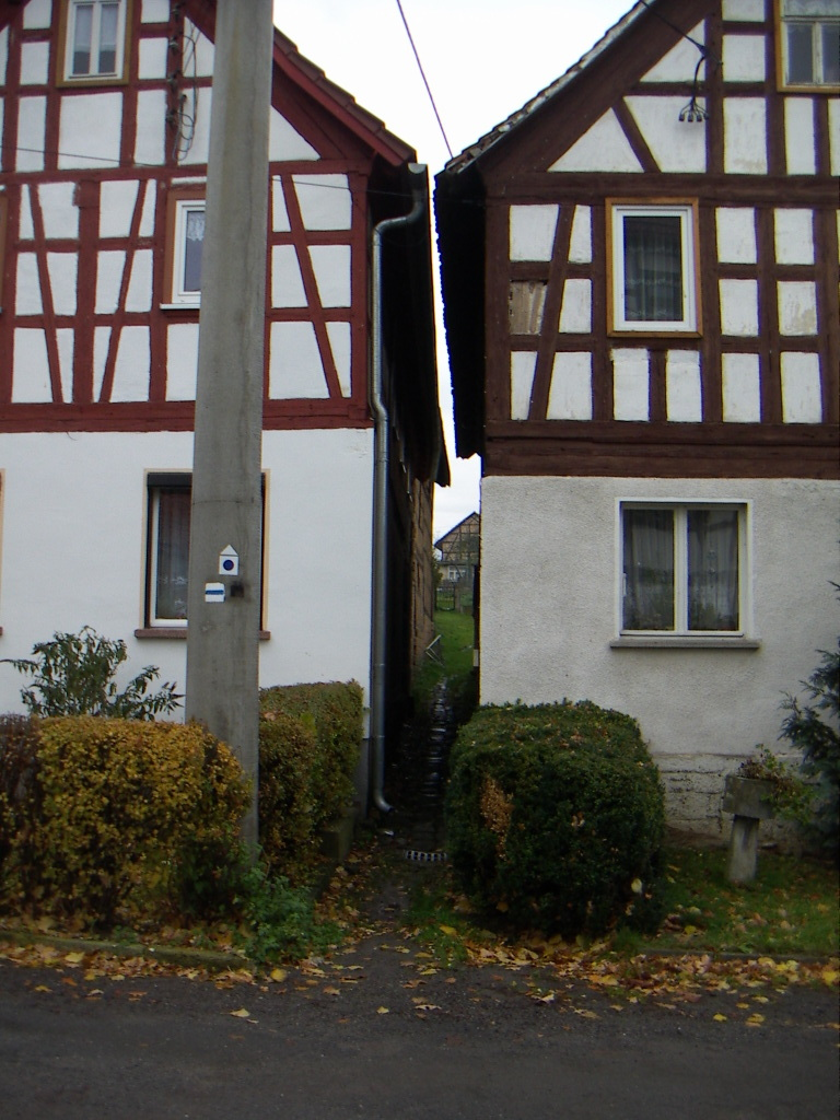 Wegmarkierung des Feengrotten-Kyffhäuser-Wegs (Fernwanderweg) in Teichweiden. Der Weg führt zwischen den Häusern hindurch.